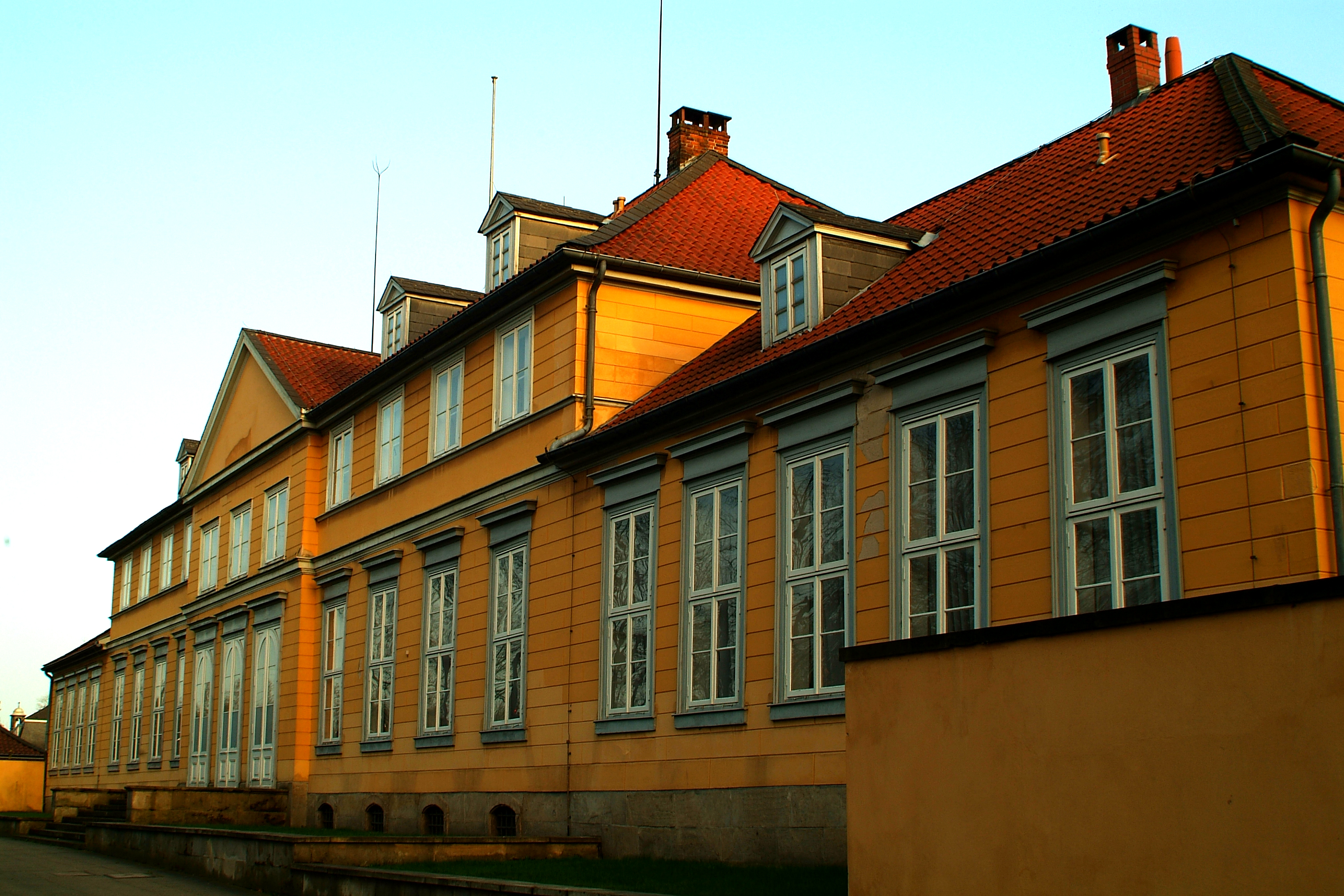 Nordseite des Fürstenhaus Herrenhausen